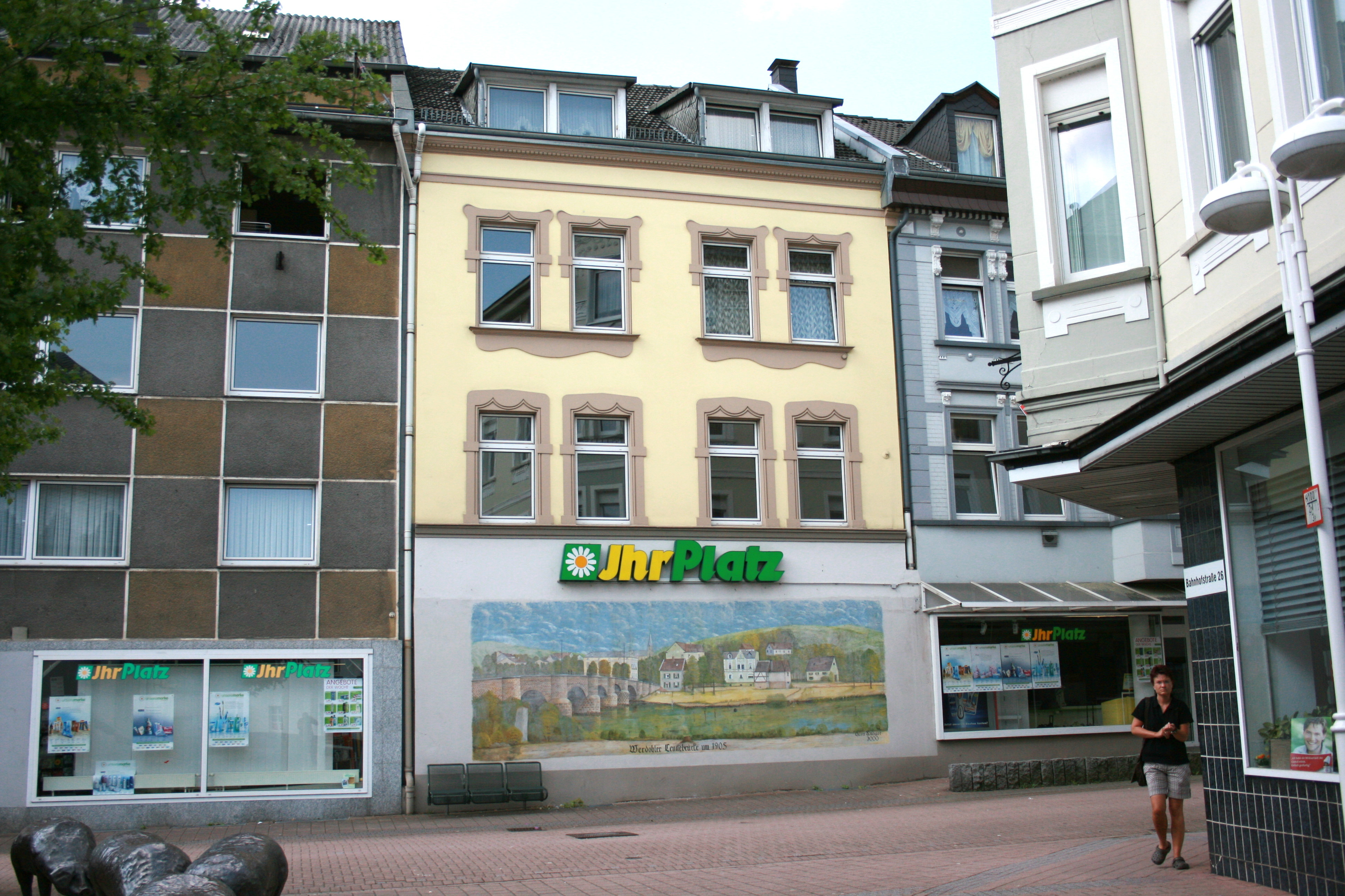 Bahnhofstraße in Werdohl